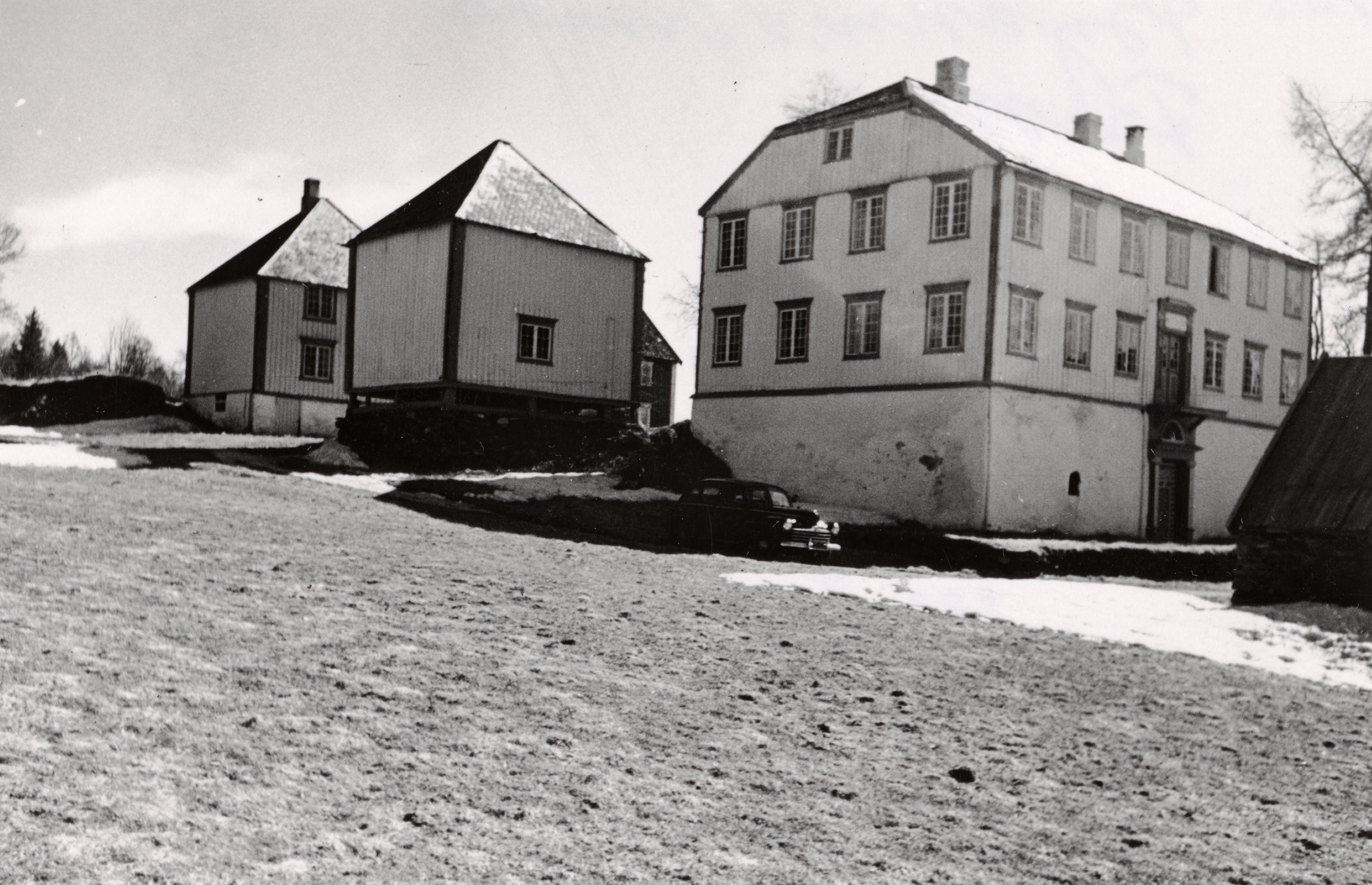 Ferstad i Strinda, Sør-Trøndelag